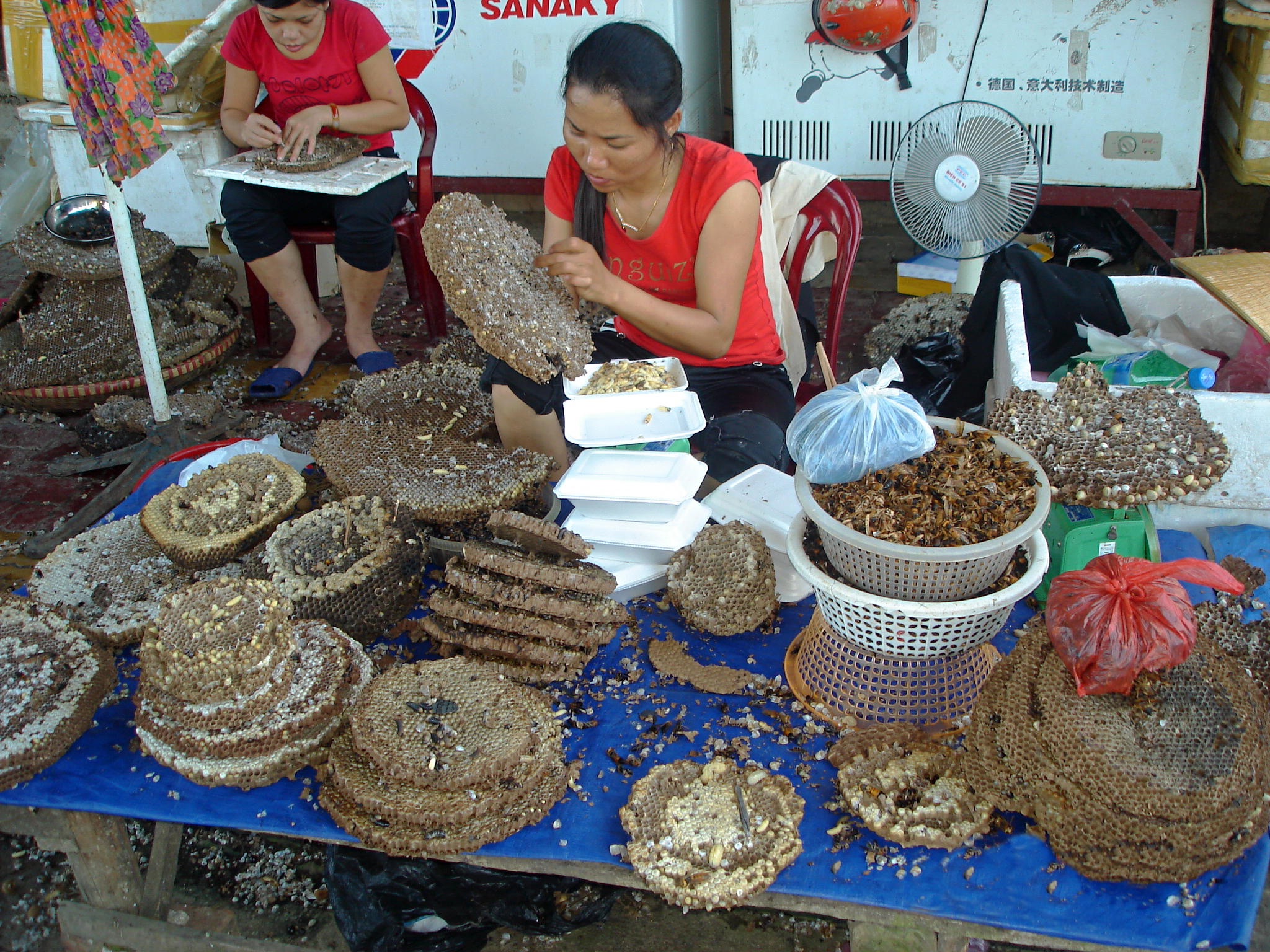 Honigstand auf dem Markt von Cao Bằng